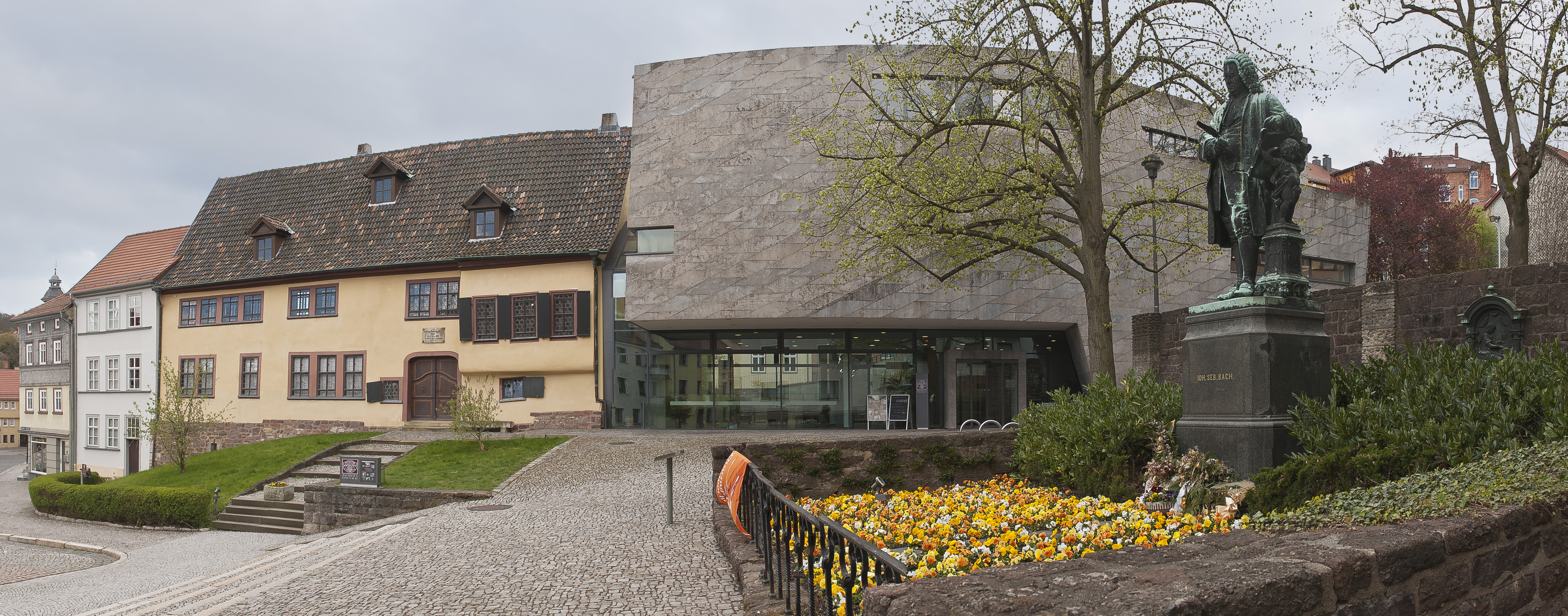 Bachhaus und Bach-Denkmal, Eisenach